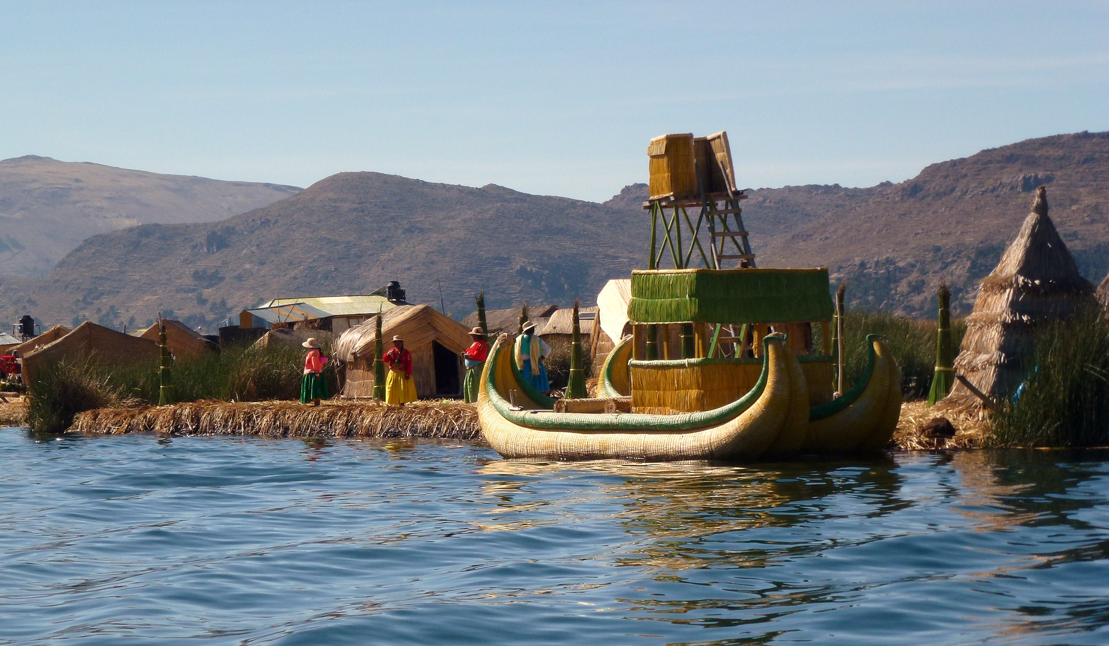 Sur le Lac Titicaca les Aymara du Pérou